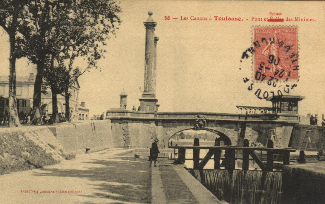 Toulouse (Haute-Garonne, France) - Porte des Minimes et canal du Midi.